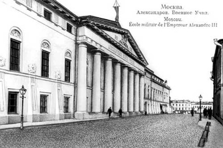 открытка конца XIX века